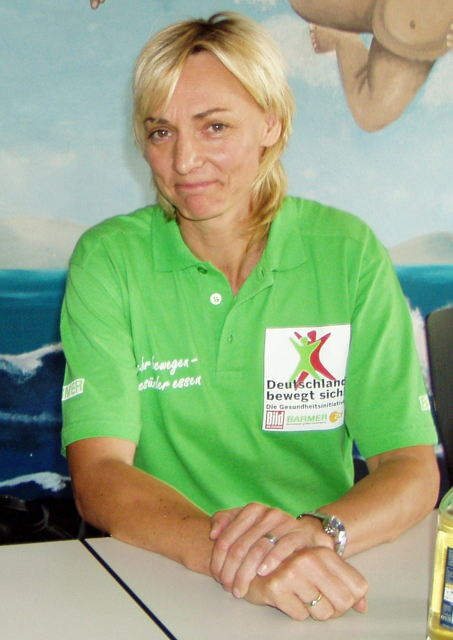 Heike Drechsler (* 1964), Leichtathletin und Weitsprung-Olympiasiegerin von 1992 und 2000